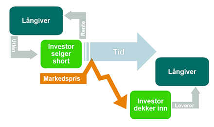 Illustrasjon på shortsalg